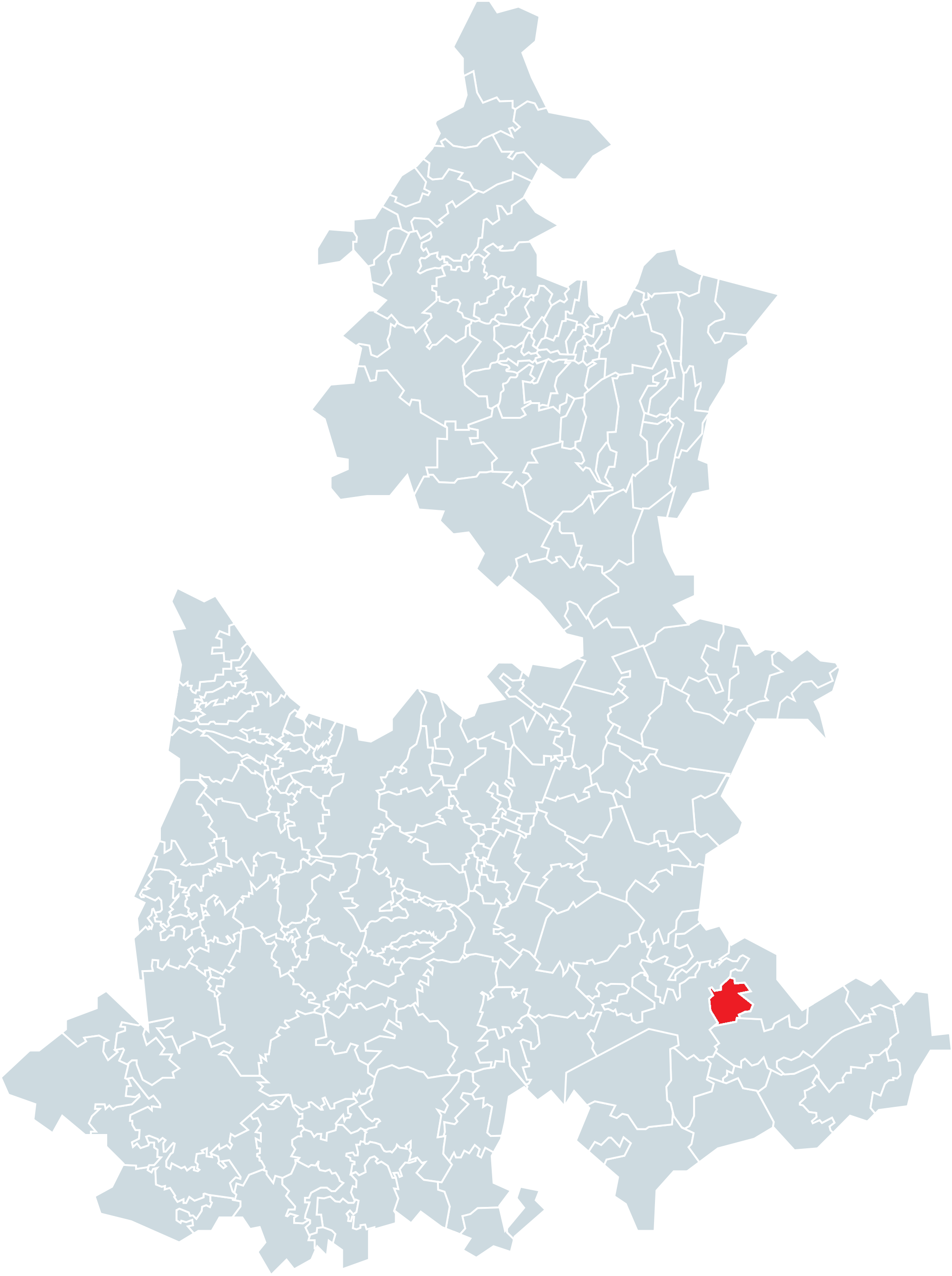 Municipio de San Antonio Cañada